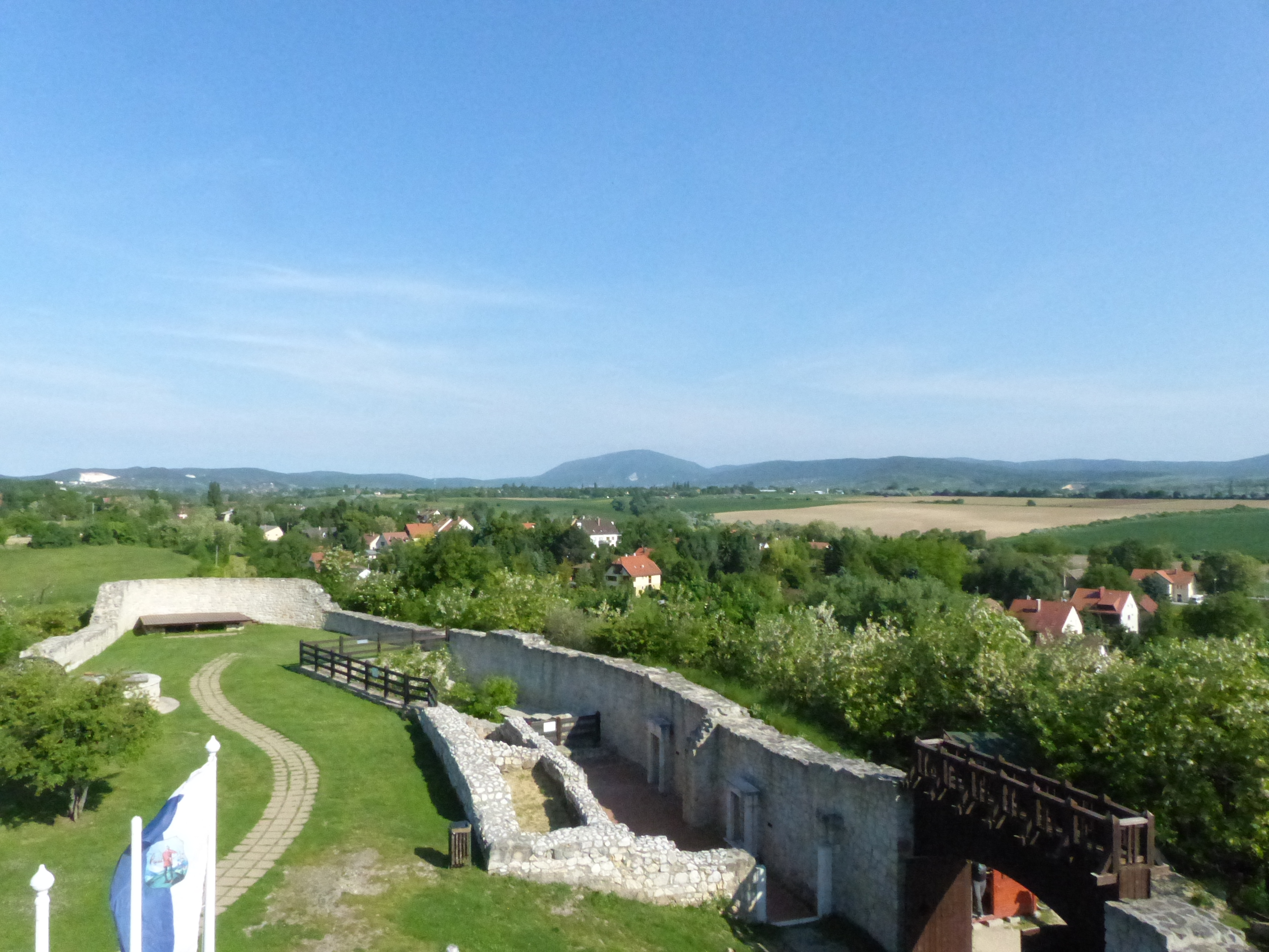 A felvételek szombaton, 2017. május 20-án készültek Sólyomváron (Solymár). Valkó Arisztid és Jablonkay István a Sólyomvár feltárói. J. V. Haefler véleménye szerint Solymár község neve a Sólyomvár összeolvadásál eredt. A Schlossberg: magyar megfelelője: "Várhegy". Az 1700-as évek elején beérkező sváb telepesek e területről hordták el a középkori vár romjait, melyből felépítették az akkori község első telepesházait. A dombtető - legelő sváb elnevezése (Schlossberg) minden bizonnyal a korábbi hagyomány német folytatása. A dűlőt sokáig legelőként használták, de a nevének köszönhetően megmaradt az egykori vár emléke a köztudatban is. A Sólyomvár feltárói a hagyományos elnevezés alapján kutattak ezen a területen a vár után. Forrás